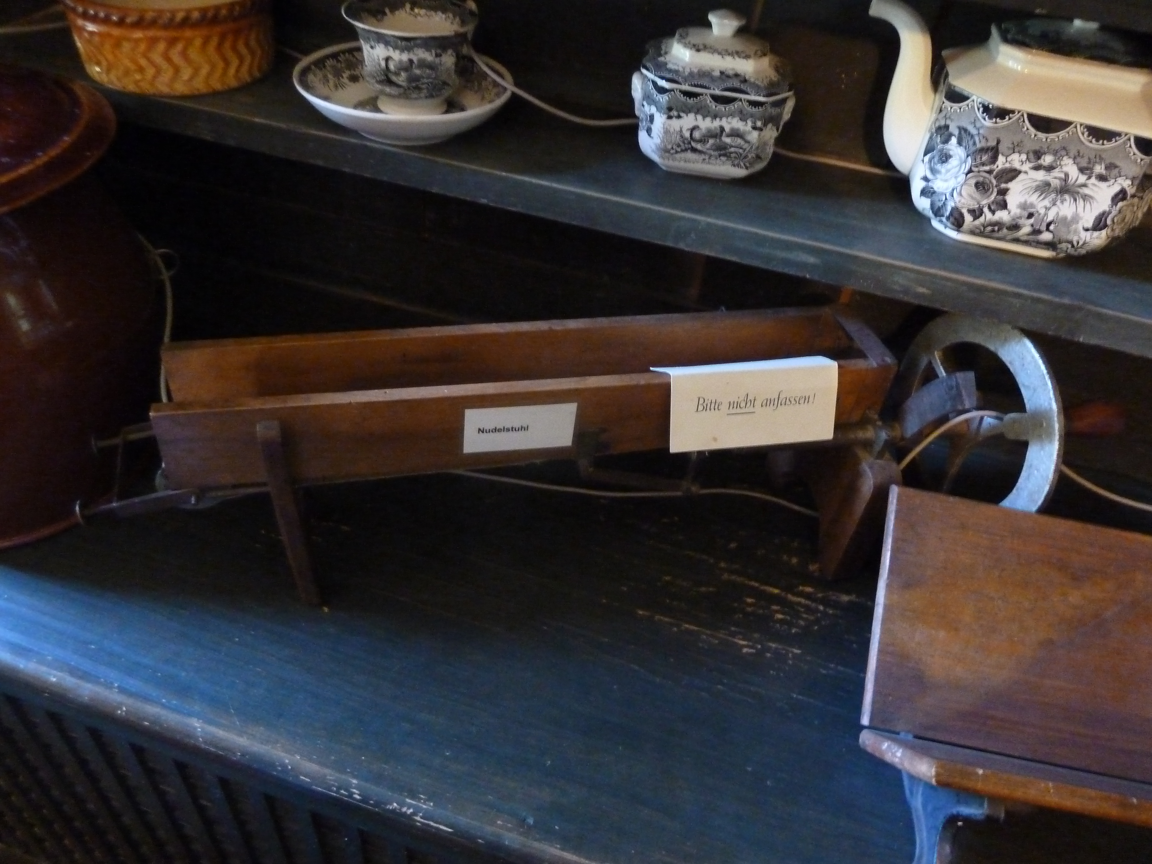 im Heimatmuseum Hüsli in Grafenhausen-Rothaus